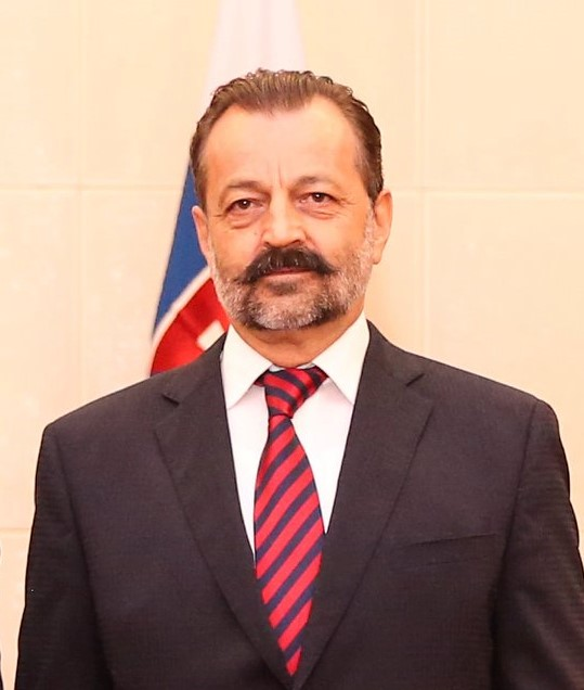 Jaroslav Chlebo übergibt seine Akkreditierung als Botschafter der Slowakei an Osttimors Staatspräsident Francisco Guterres.